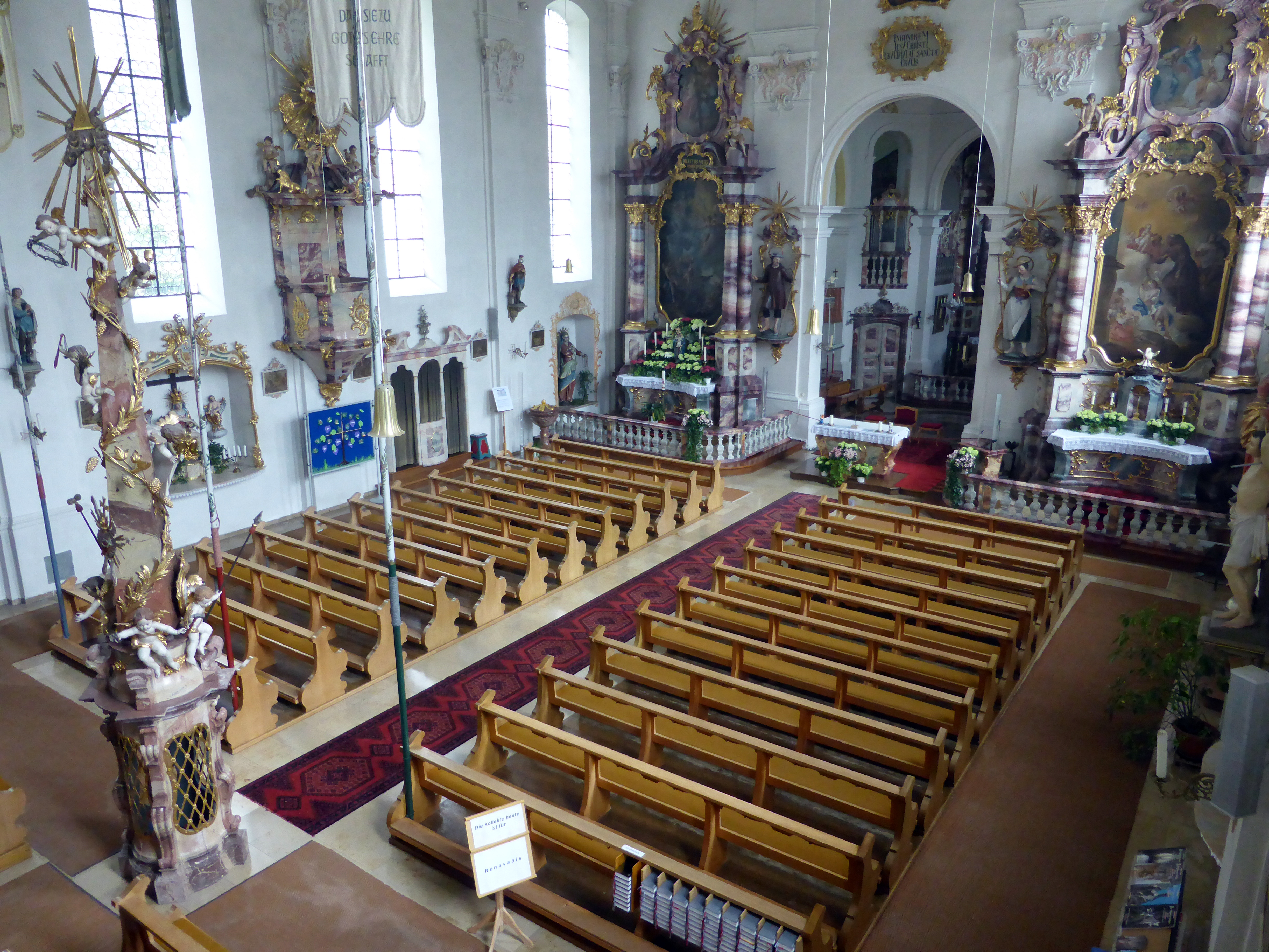 Wikipedia:Süddeutschland-Treffen im Mai 2016 in Kempten (Allgäu). Kloster Heiligkreuz - Langhaus.